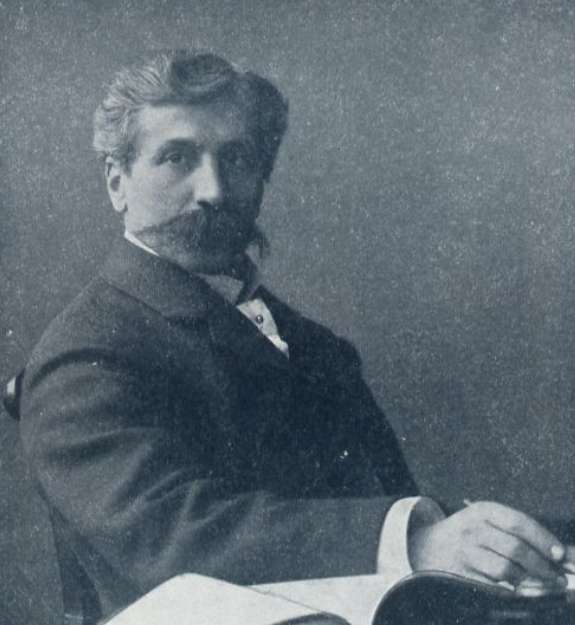 Leopold Adler, Regisseur und Dramaturg des Königlichen Schauspielhauses, c. 1903